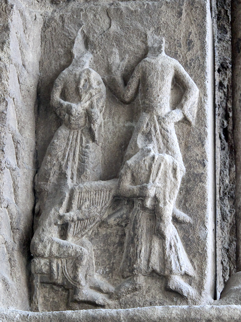 Grup de músics a la portada del Monestir de Santa Maria de Ripoll